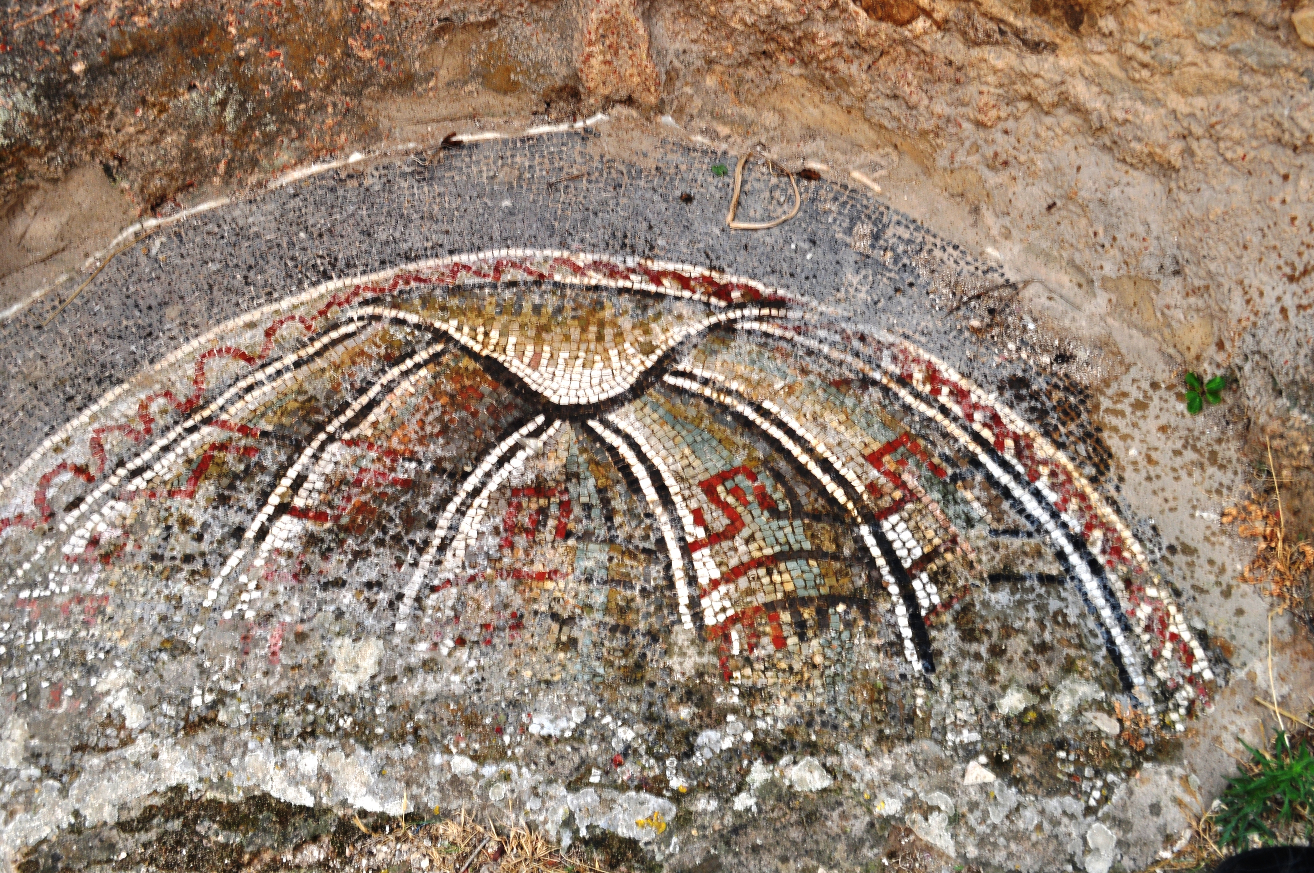 Thermes